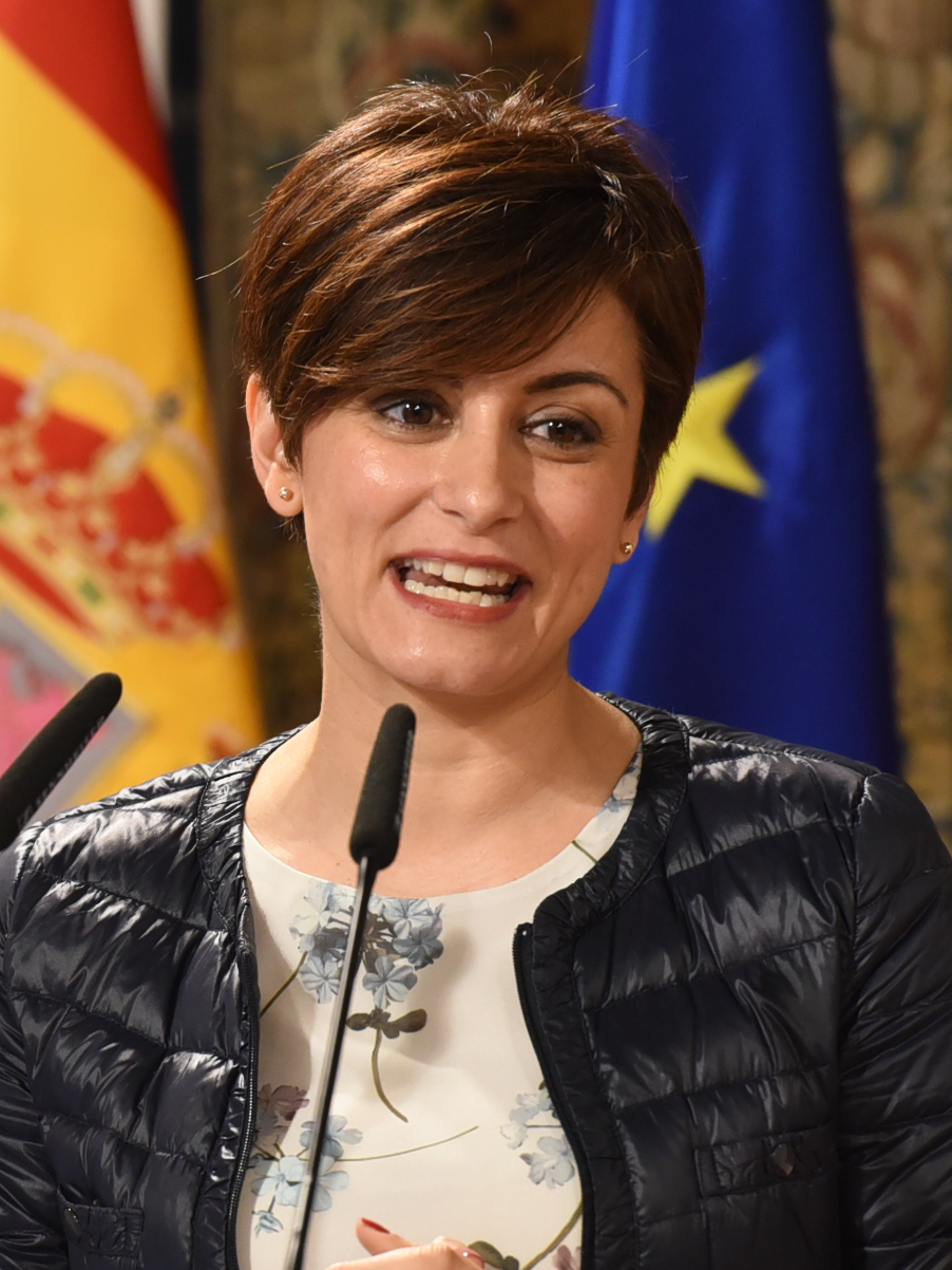 TOLEDO, 3 de febrero de 2020.- El presidente de Castilla-La Mancha, Emiliano García-Page, firma, en el Salón de Tapices del Palacio de Fuensalida, los convenios para el desarrollo de Lanzaderas de Empleo en Puertollano y Talavera de la Reina con la Fundación Santa María la Real y la Fundación Telefónica. En la imagen, intervención de la alcaldesa de Puertollano, Isabel Rodríguez. (Fotos: José Ramón Márquez // JCCM)